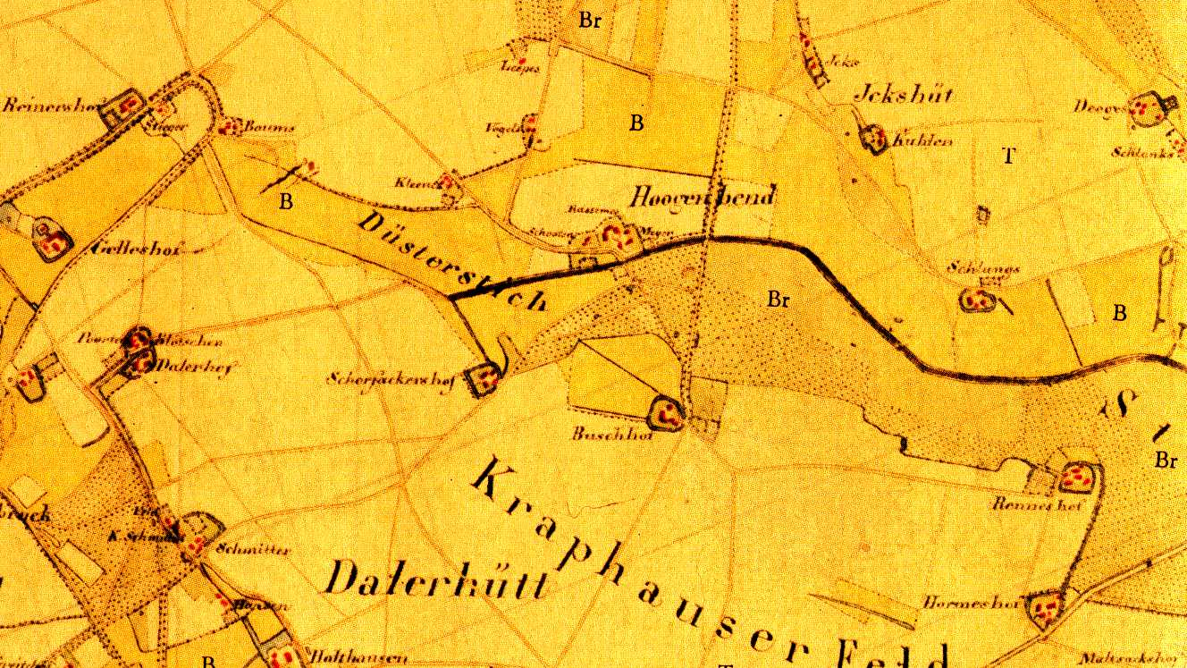 Kartenaufnahme der Rheinlande durch Tranchot und von Müffling, Blatt 35 (Kempen), Ausschnitt mit dem Gebiet von Hochbend.